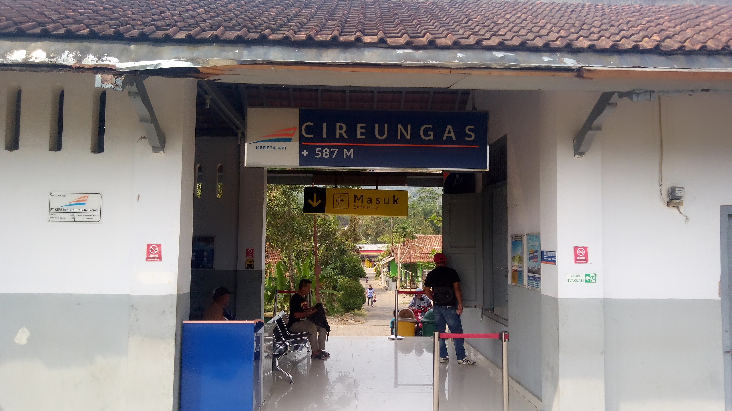 Pintu masuk stasiun cireungas